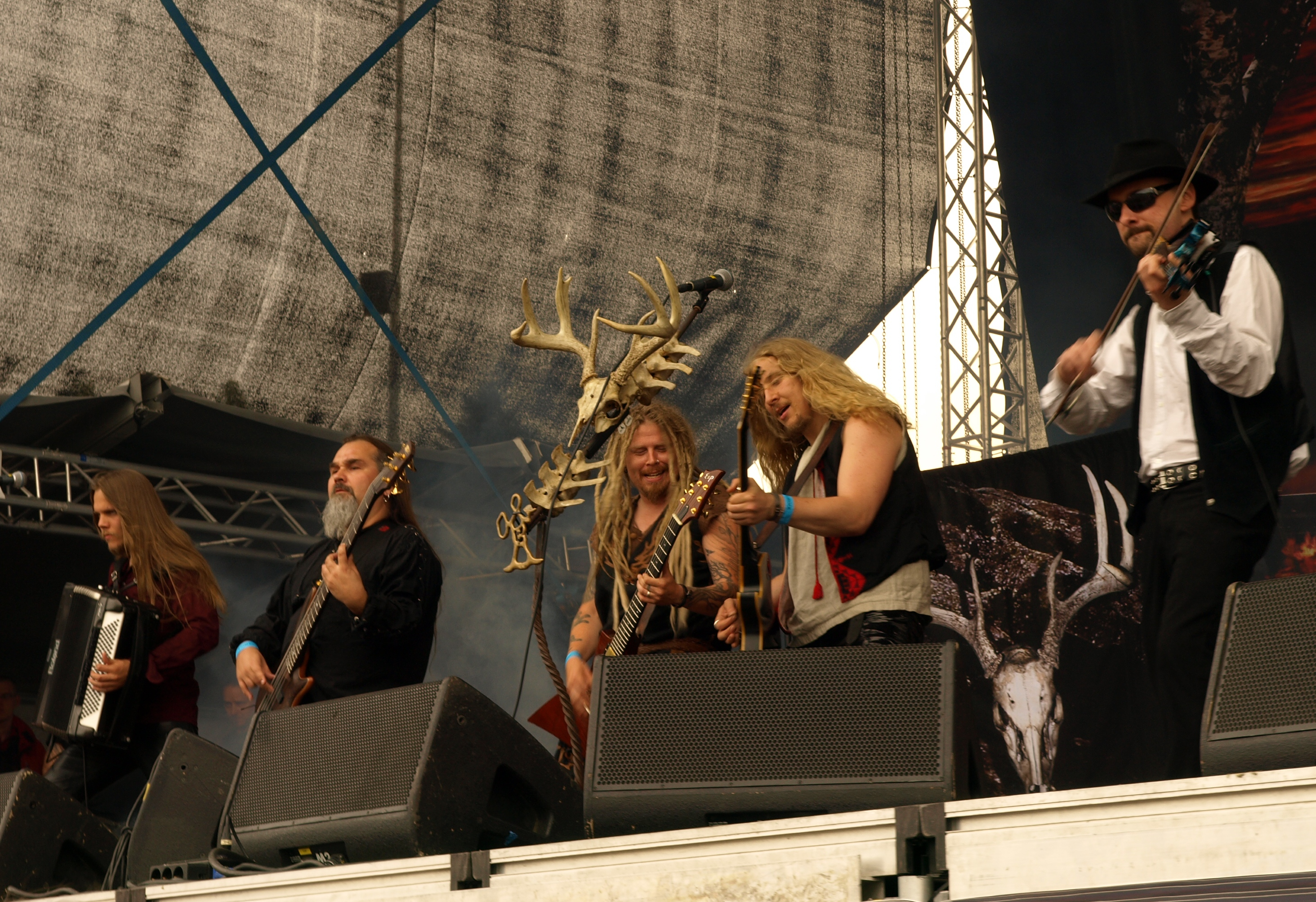 Korpiklaani live am Myötätuulirock 2011